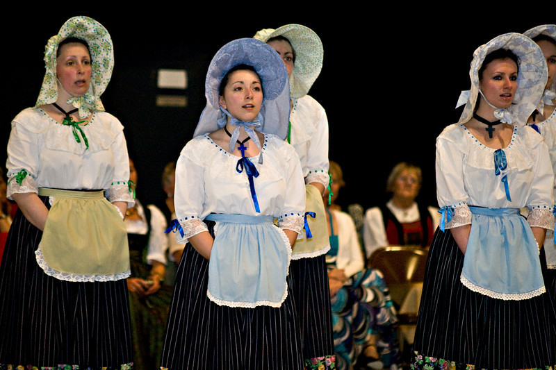 Le costume varie sur quelques éléments d'une personne à l'autre.